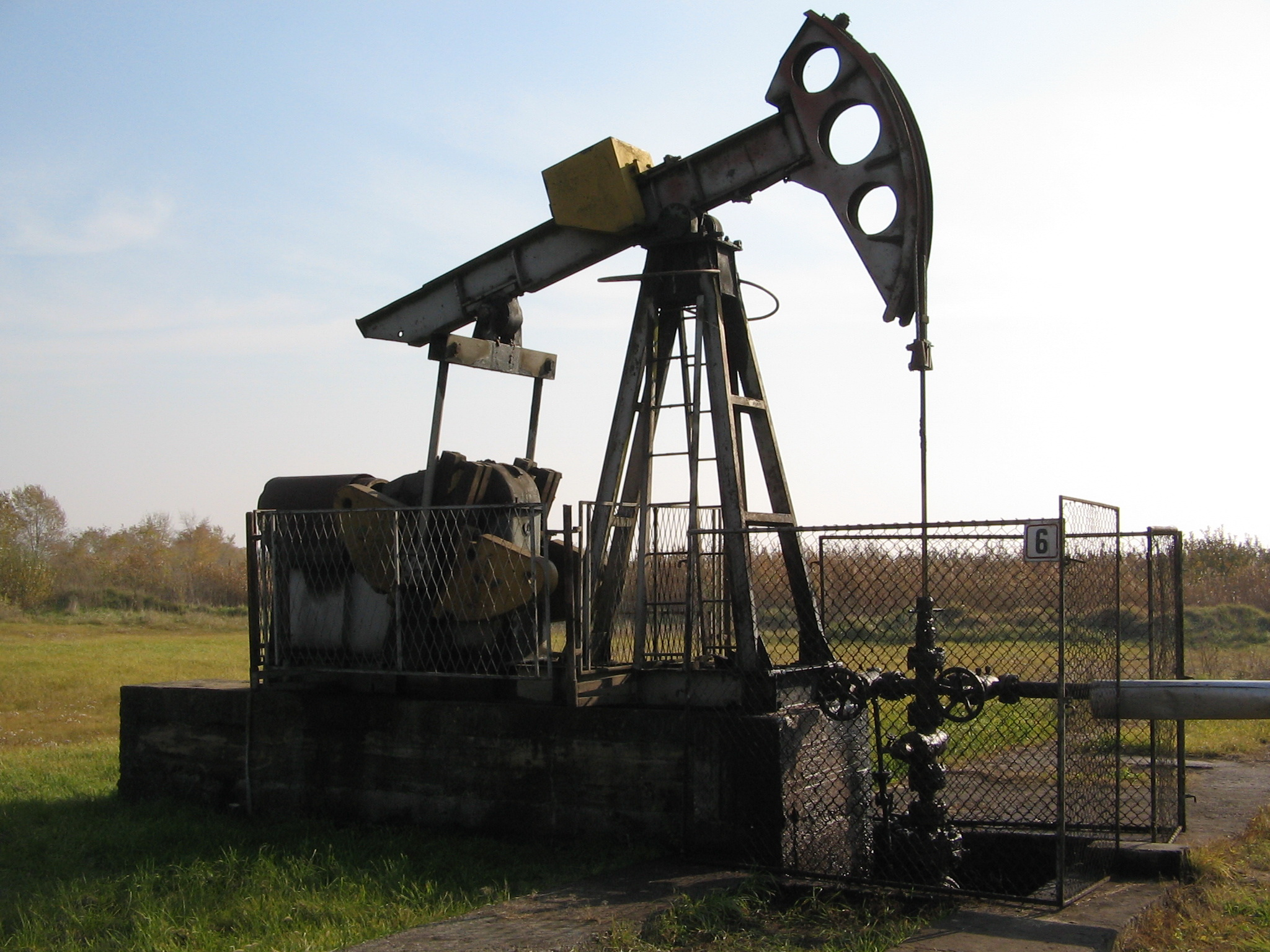 Imamo sve u Vojvodini, SVE!